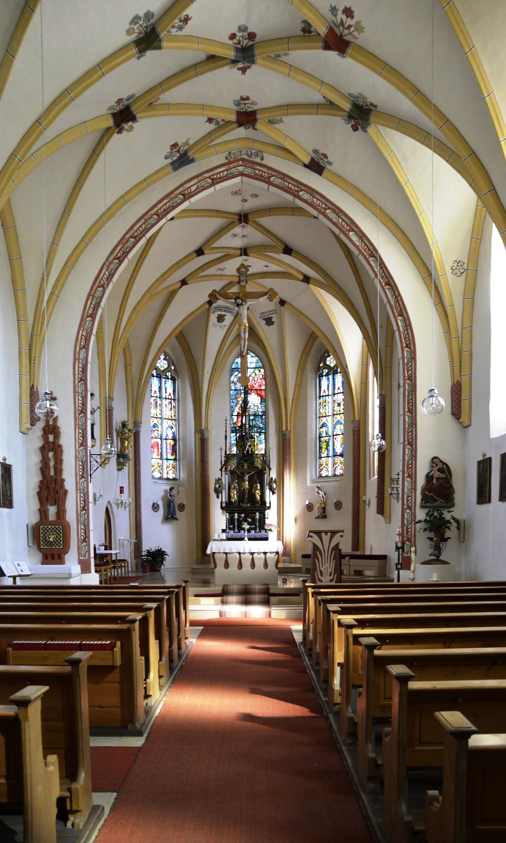 Im Inneren der Pfarrkirche Heiligkreuzauffindung in Aunkirchen.